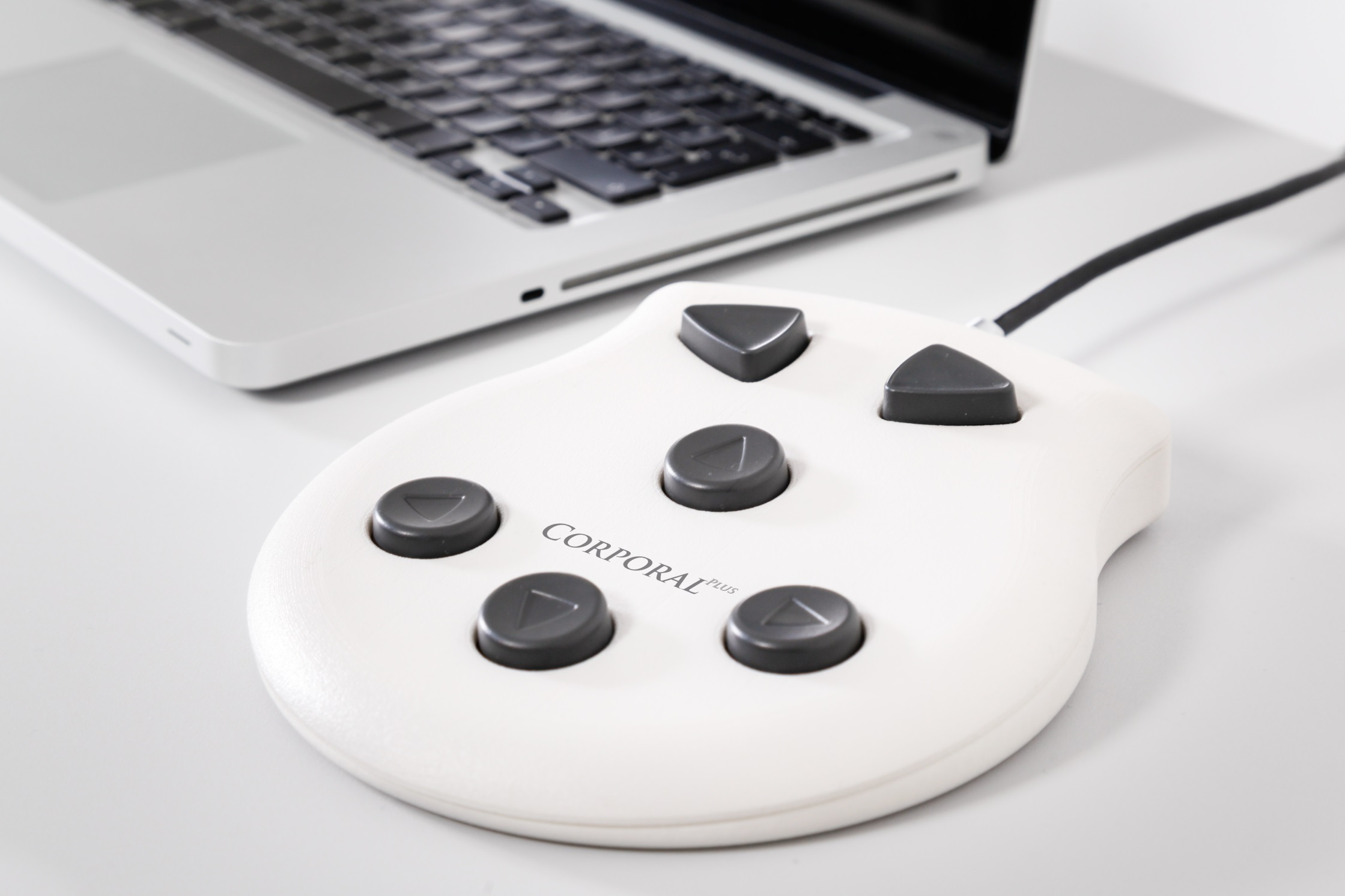 Überarbeitetes Tastengerät des Testsystems Corporal Plus